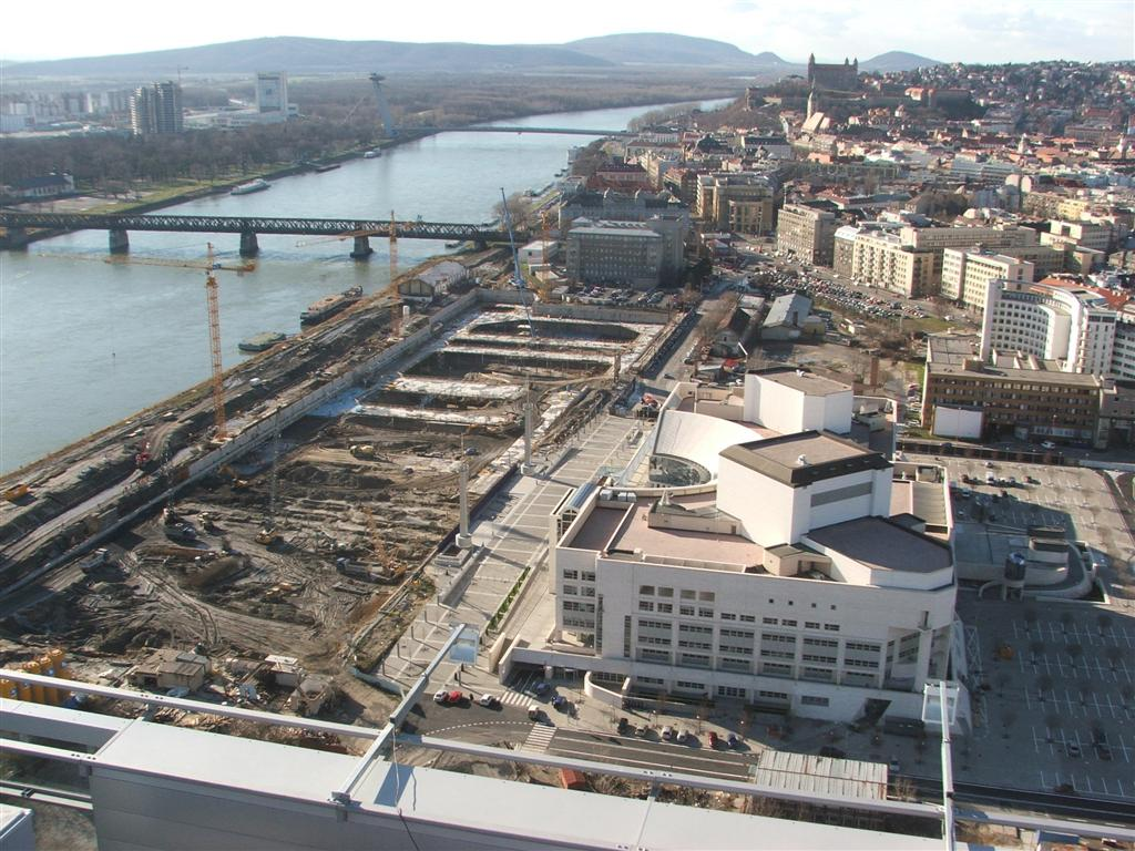 Výstavba Eurovea (9.2.2007)